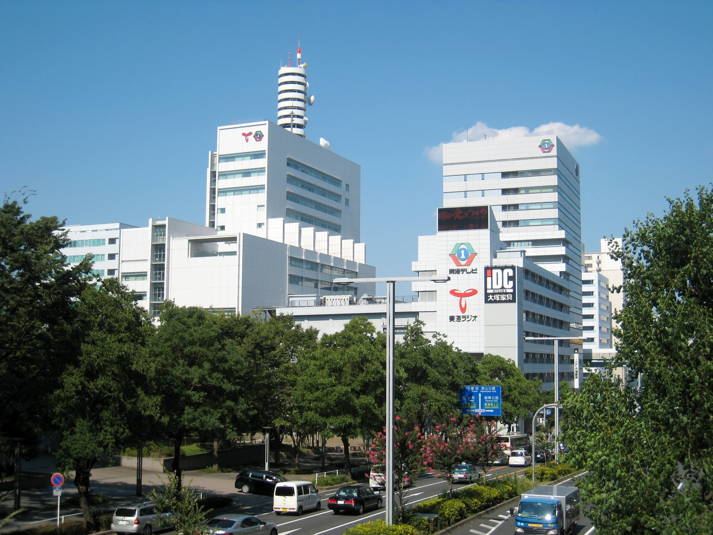 東海テレビ・東海ラジオ本社とIDC大塚家具ショールーム